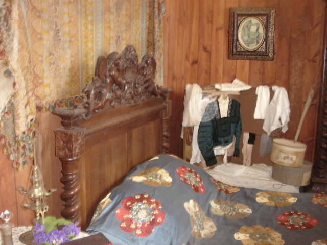 Lit et chambre de Sarah Bernhardt dans le fort de la Pointe des Poulins à Belle-Île-en-Mer (Morbihan, France).